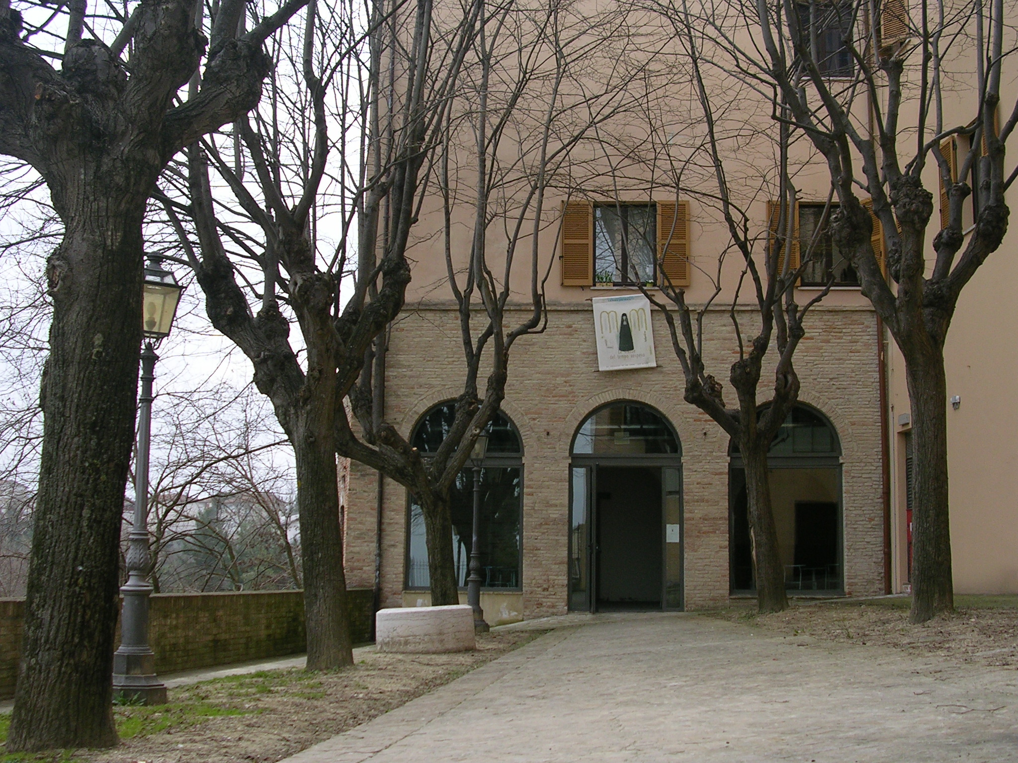 Le stanze del tempo sospeso - Museo delle arti monastiche Categoria:Serra de' Conti Categoria:Musei della provincia di Ancona